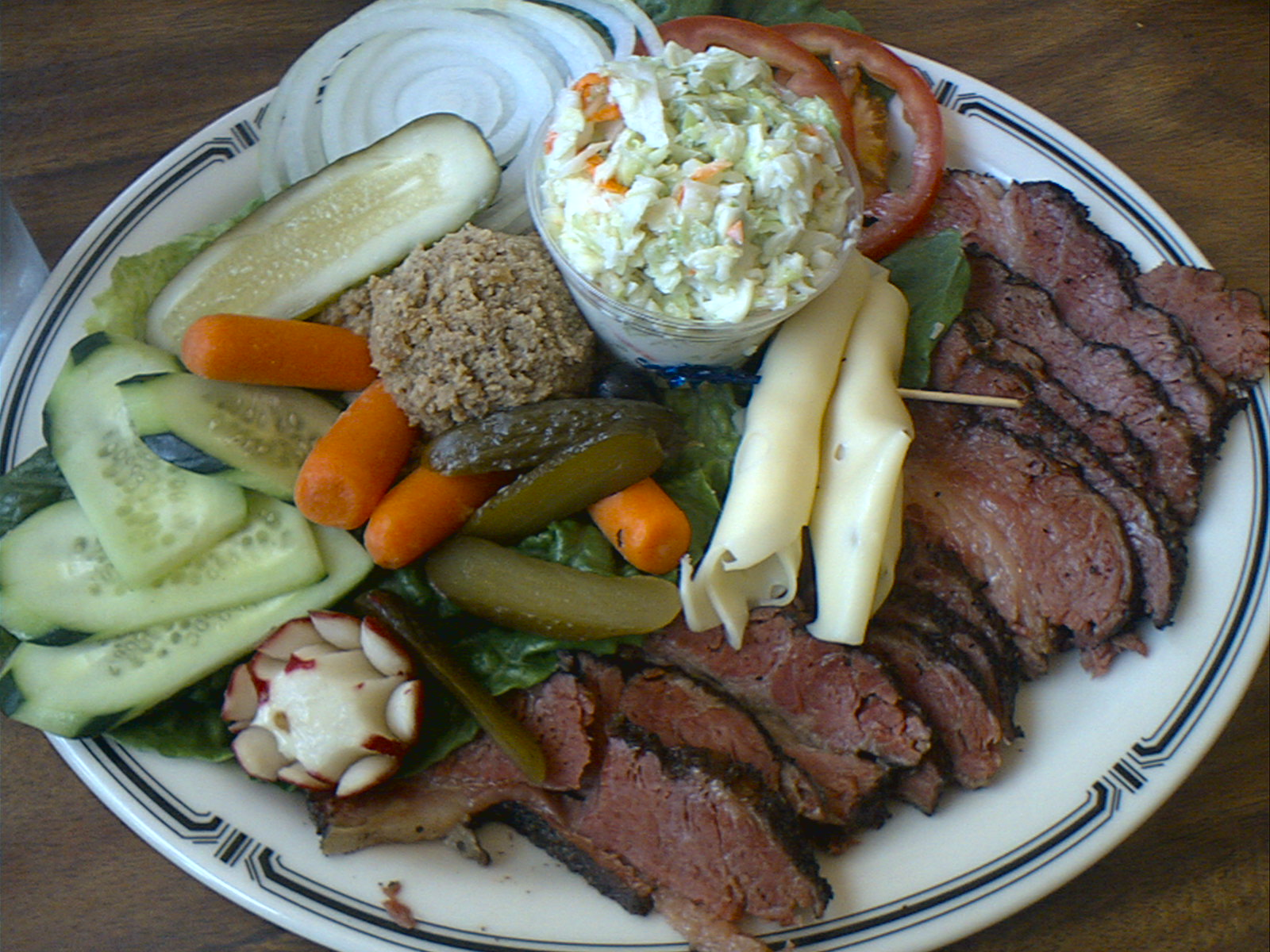 Langer's Pastrami Platter